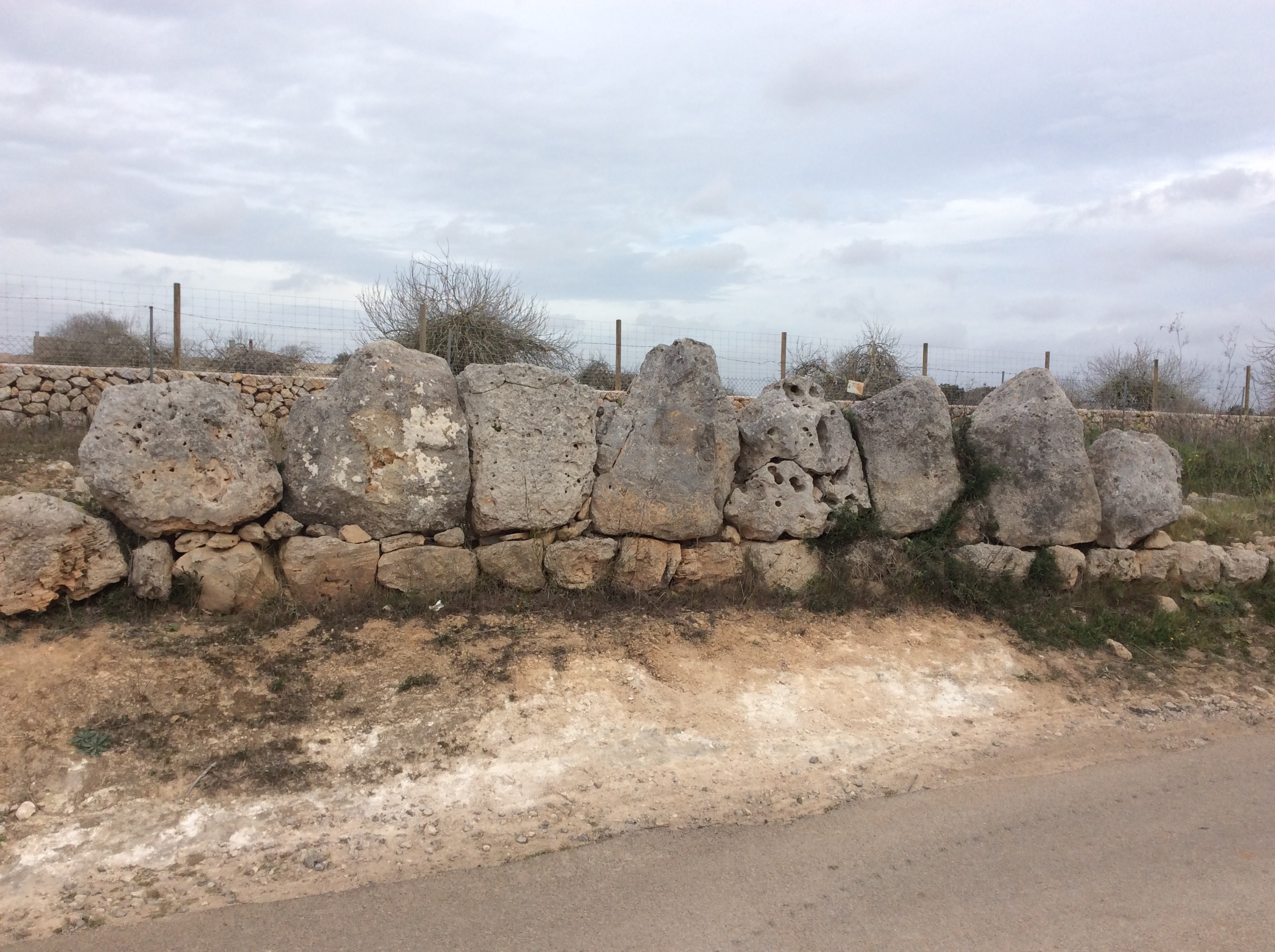 Es Pou Celat / Alqueria Blanc (Porreres)